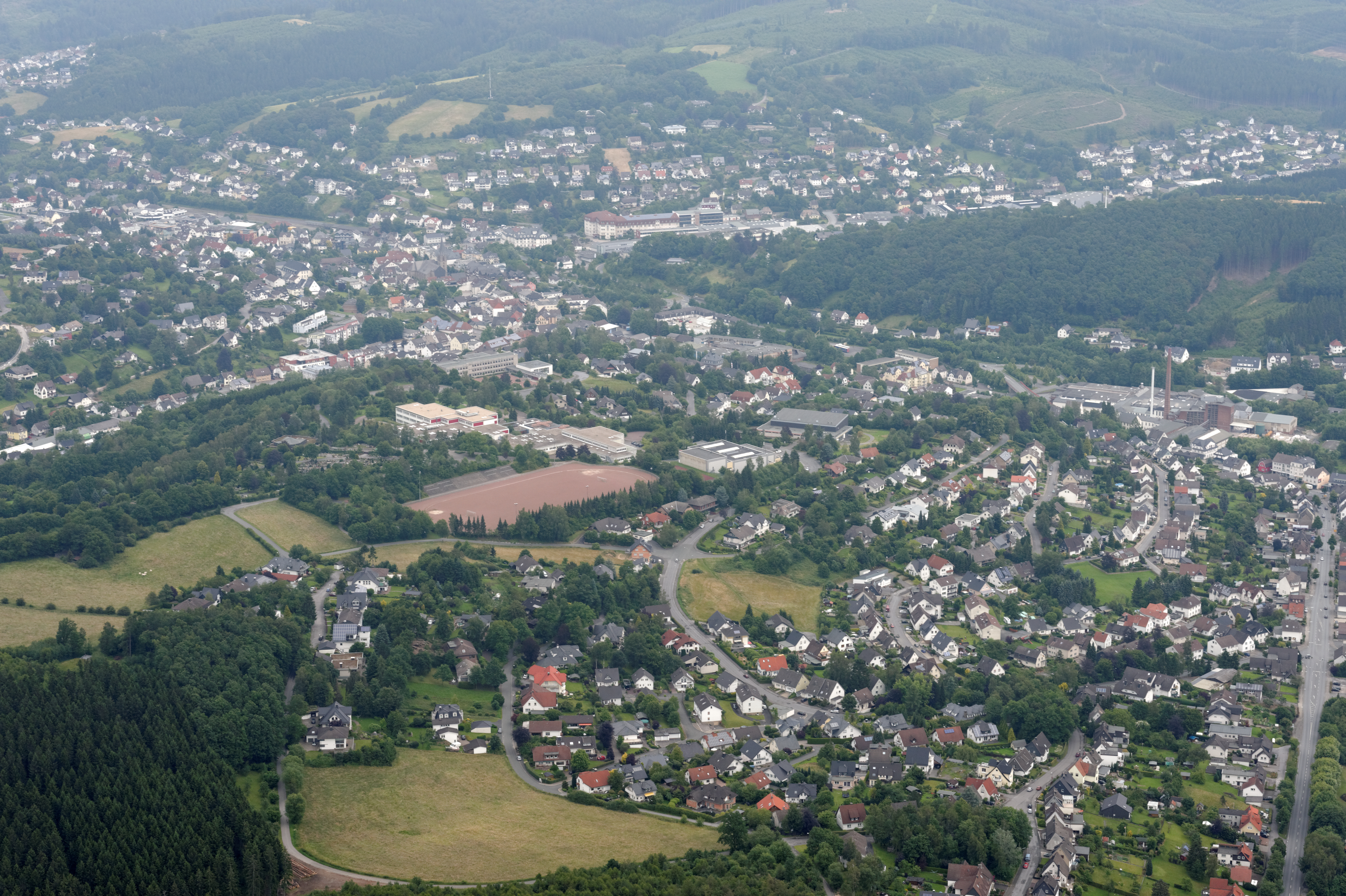 Fotoflug Sauerland-Nord. Teilansicht von Sundern (Sauerland), Blickrichtung Ost. The making of this document was supported by the Community-Budget of Wikimedia Germany.